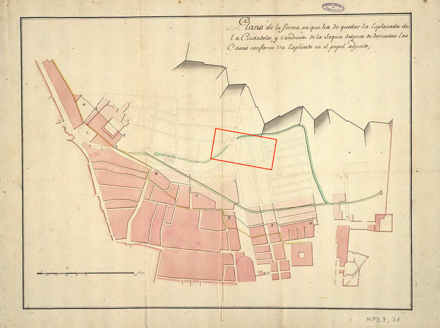 Plano de la forma en que ha de quedar la esplanada de la ciudadela y conducción de la sequia despues de derivadas las casas conforme va explicado en el papel adjunto [Material cartográfico] AGS. Secretaría de Guerra, Legajos, 03304. En carpeta con tít. : Ciudadela de Barcelona, año 1718. Sobre la demolición de la 1ª y 2ª linea de casas que embarazan la esplanada. Con la explicación aludida y carta de D. Jorge Próspero Verboom, Barcelona, 8 de junio de 1718